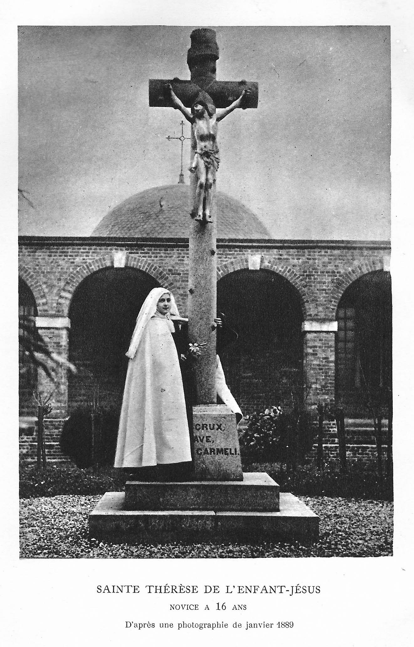 Gravure de Sainte Thérèse de l'Enfant Jésus, Histoire d'une âme écrite par elle-même, Lisieux, Office central de Lisieux (Calvados), & Bar-le-Duc, Imprimerie Saint-Paul, 1937, édition 1940. « Sainte Thérèse novice à 16 ans. Photographie de janvier 1889 ».